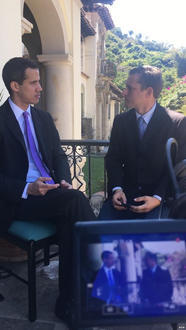 El presidente encargado de Venezuela, Juan Guaidó, en entrevista con la Voz de América.